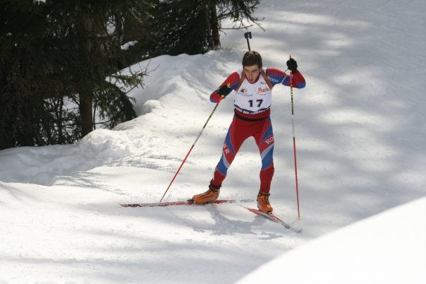 See Title